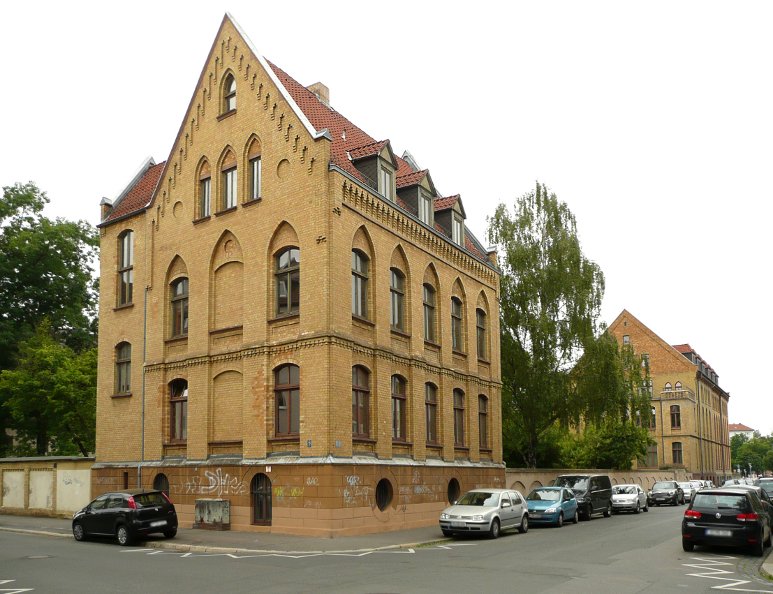 Niedersächsisches Landesamt für Denkmalpflege